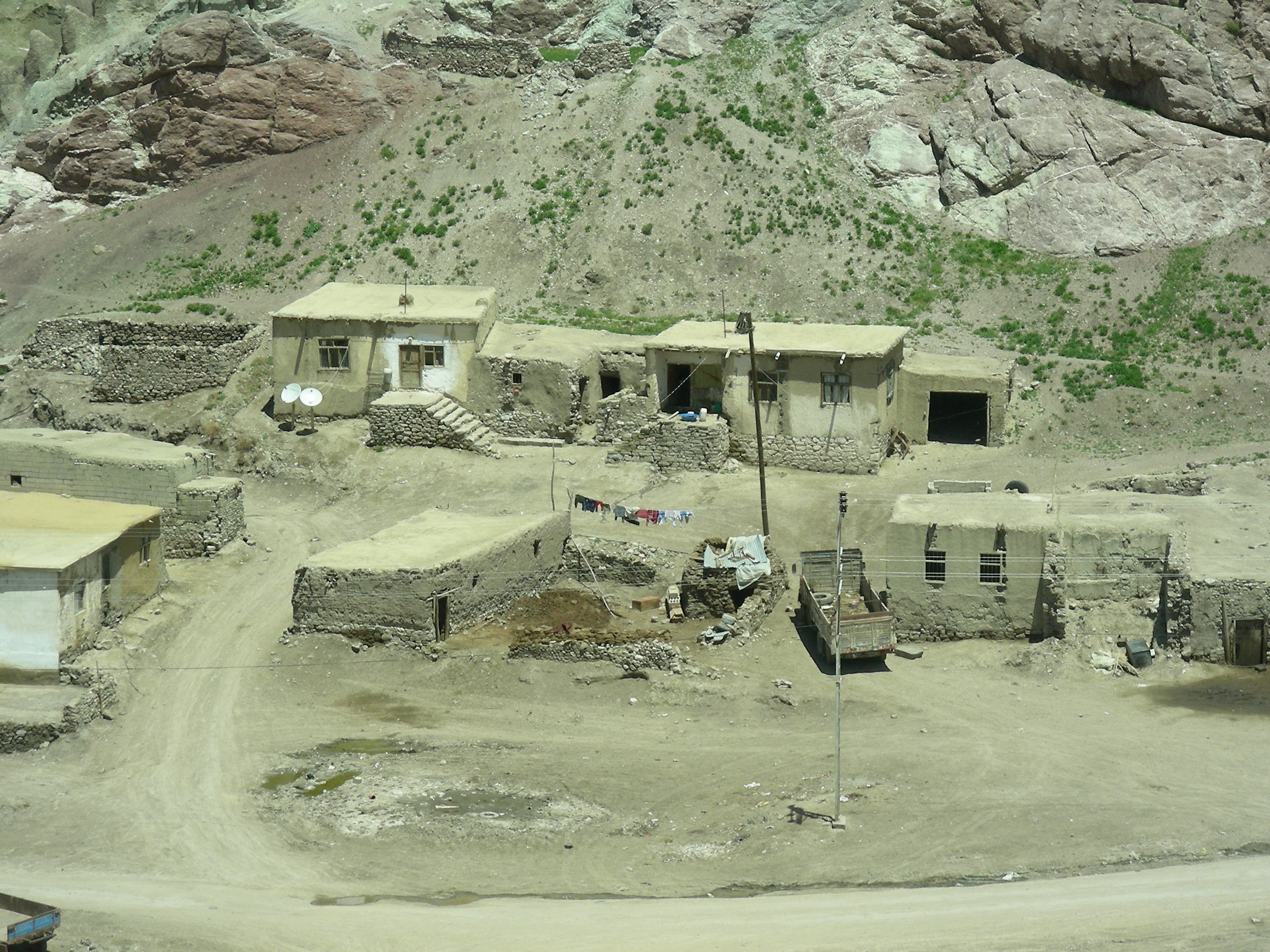 Güzelsu